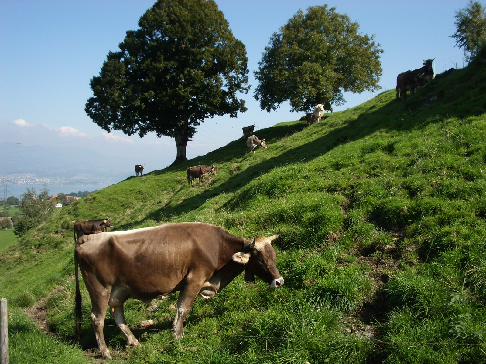 Highland farming, Feusisberg / Switzerland self-made, September 2005